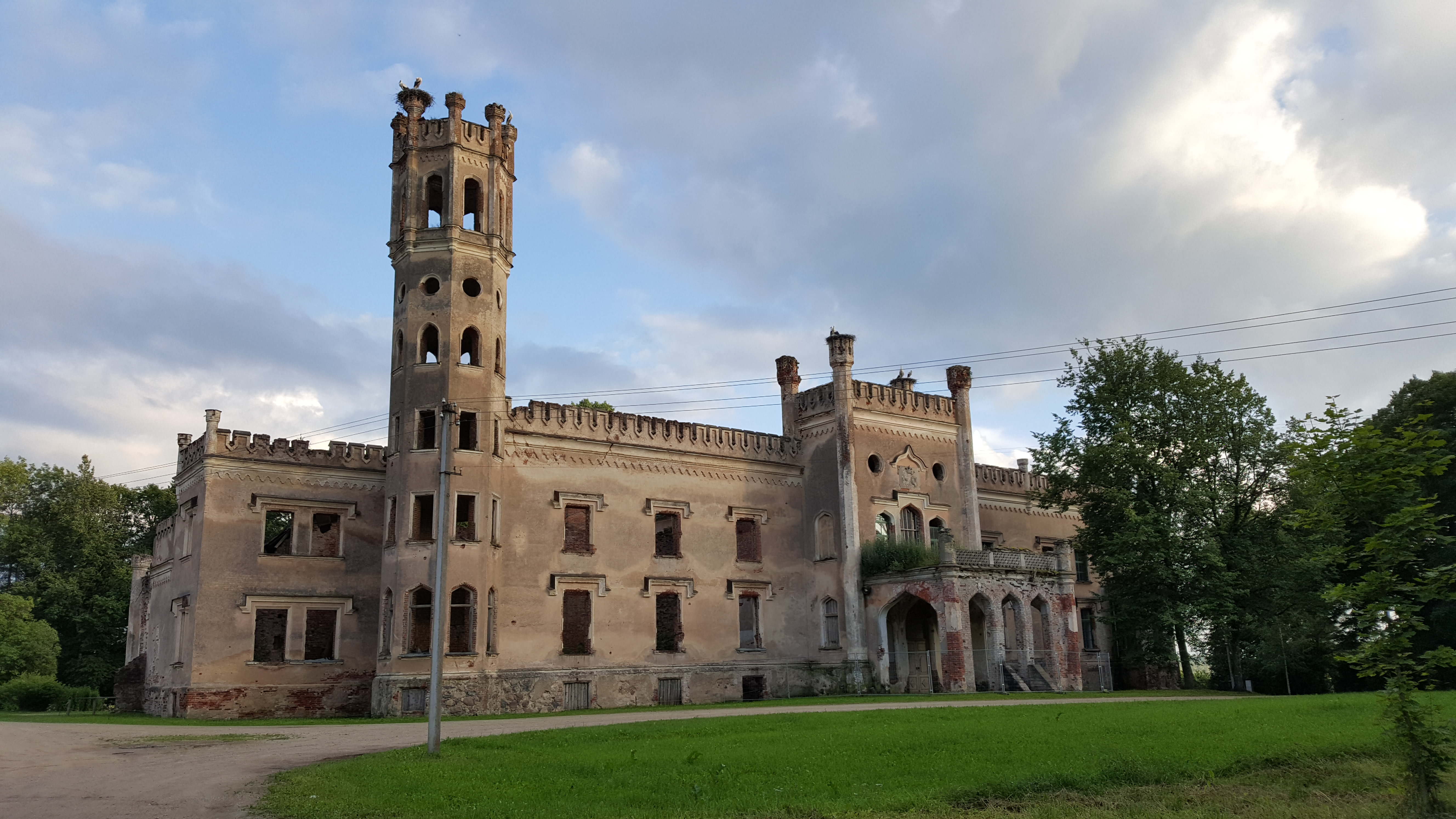 Odziena mõisa peahoone 2017. aastal.jpg